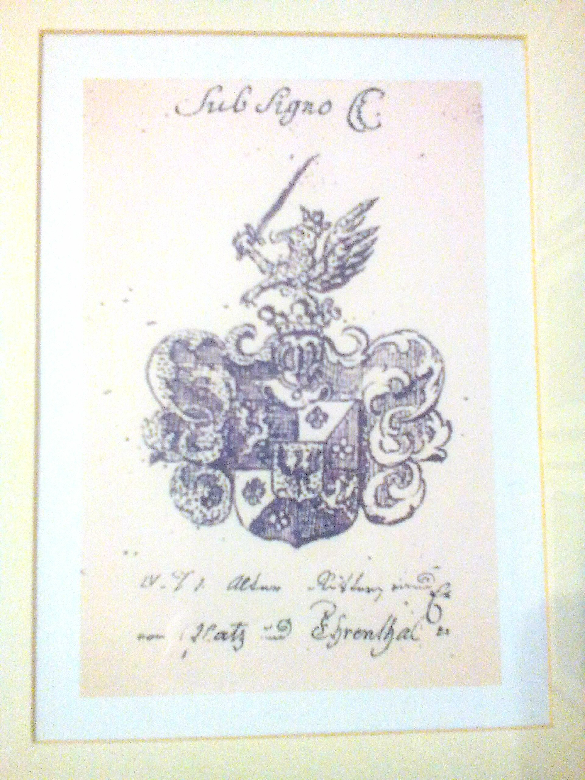 návrh nobilitace do starého českého stavu rytířského (rodinný archiv)